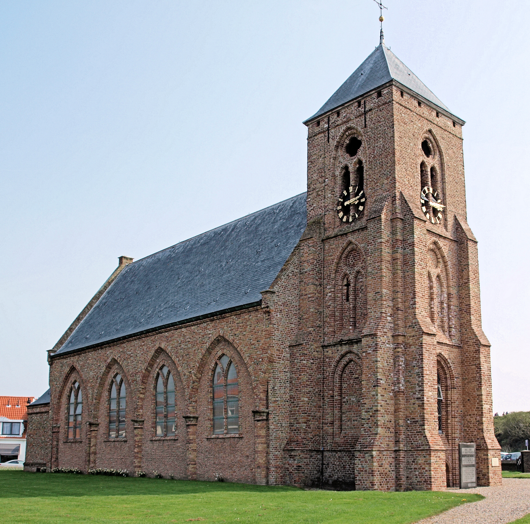 kerk in zouteland zeeland noordzijde met zuilen